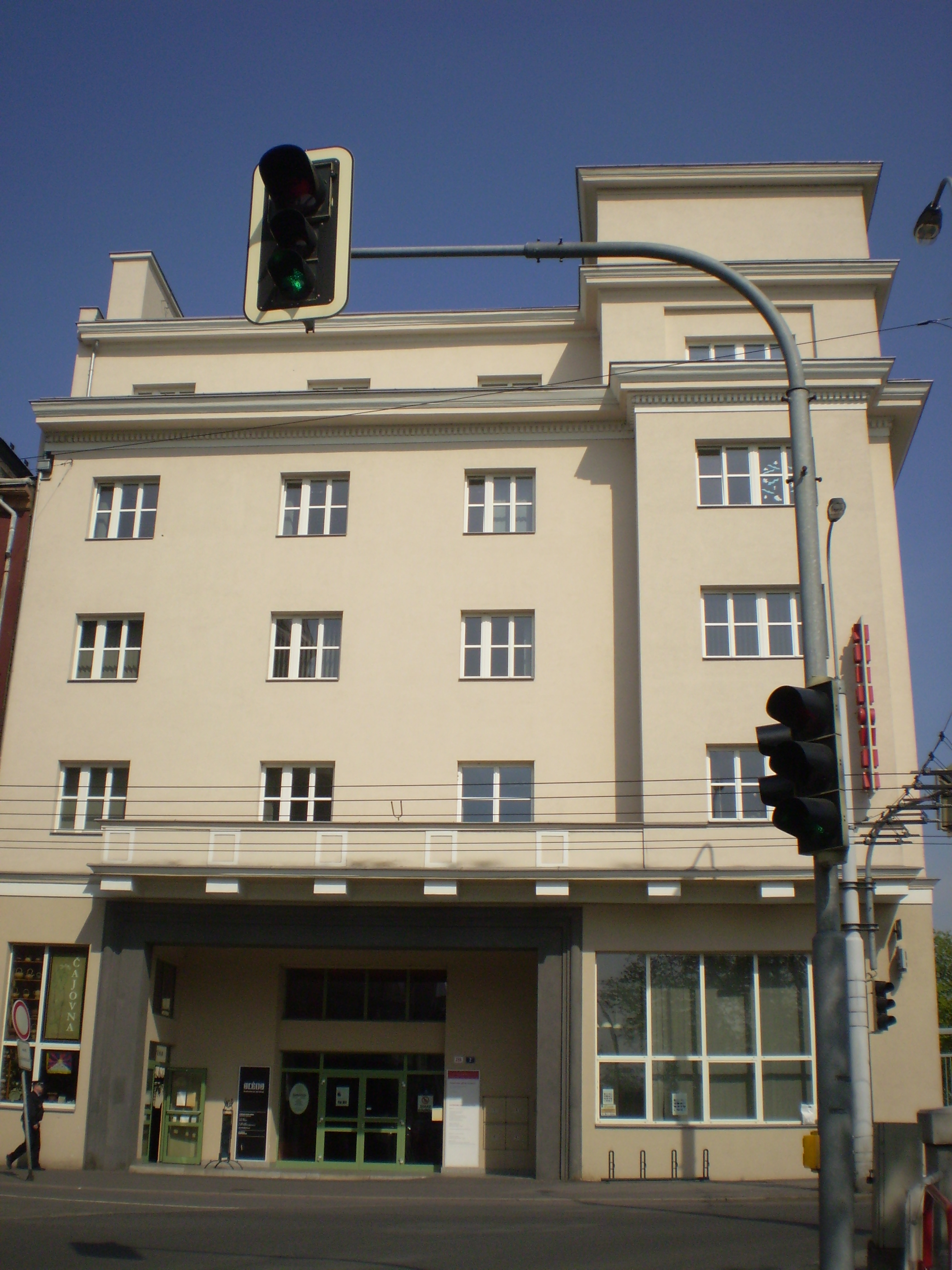 Divadlo Aréna v Ostravě.